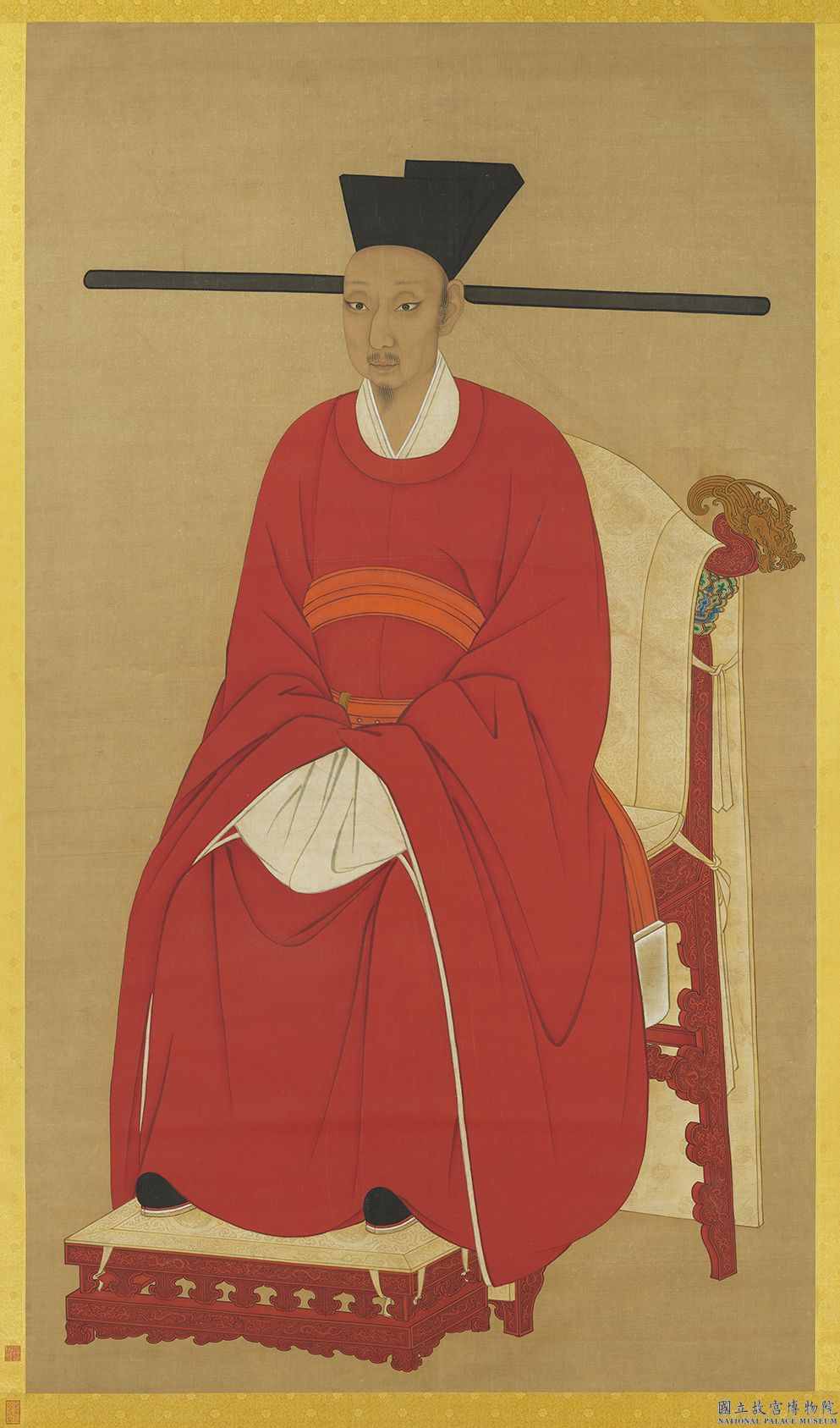 Portrait assis de l'empereur Song Ningzong